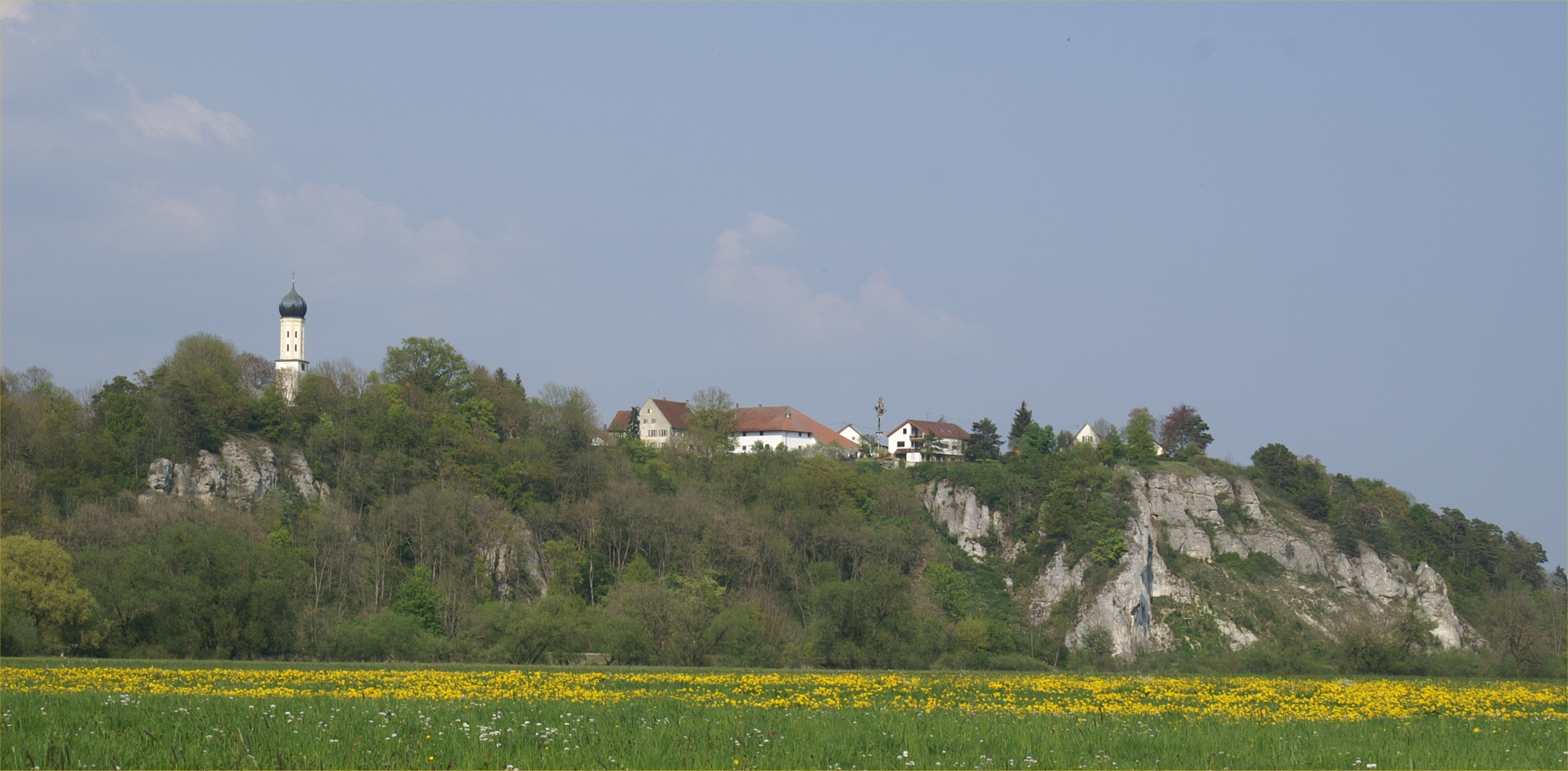 Unterhalb des Geländeabbruchs fließt die Donau an Neuburg vorbei